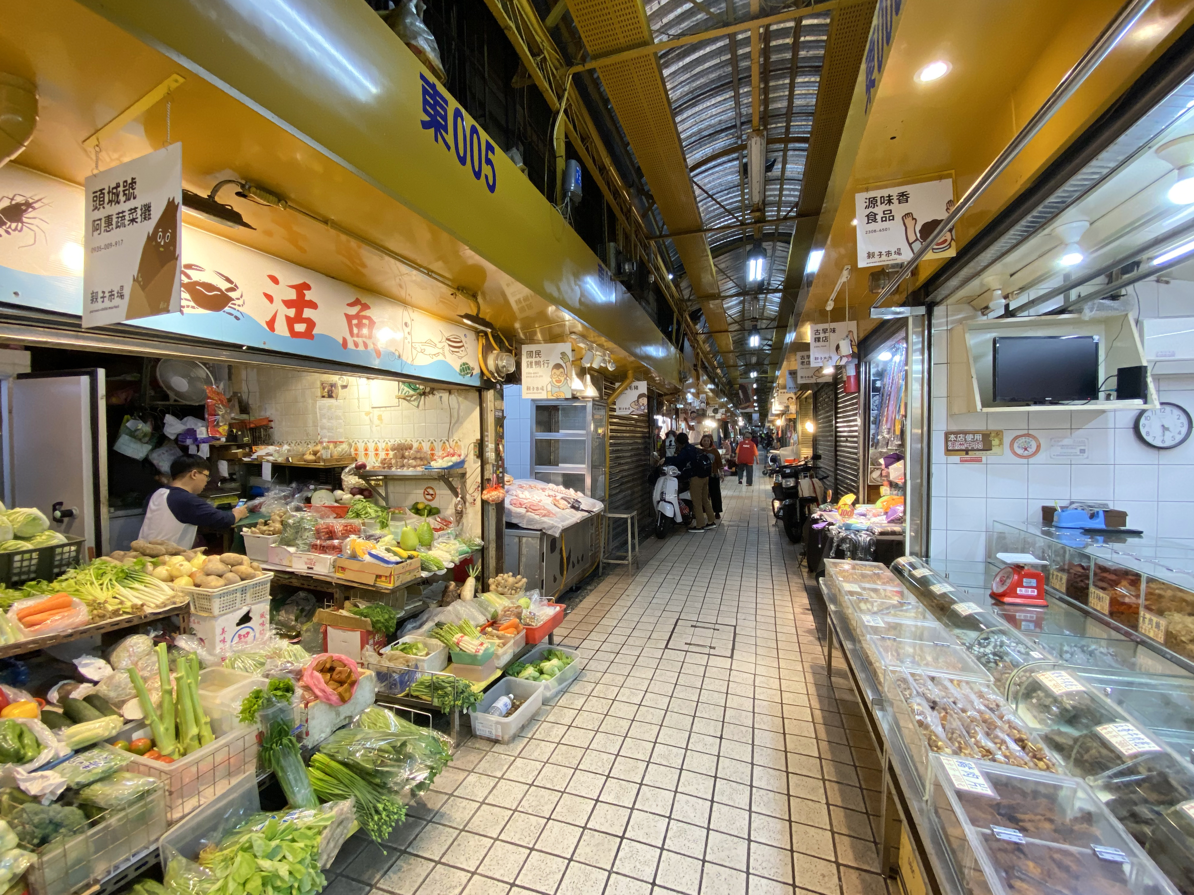 Xinfu Market